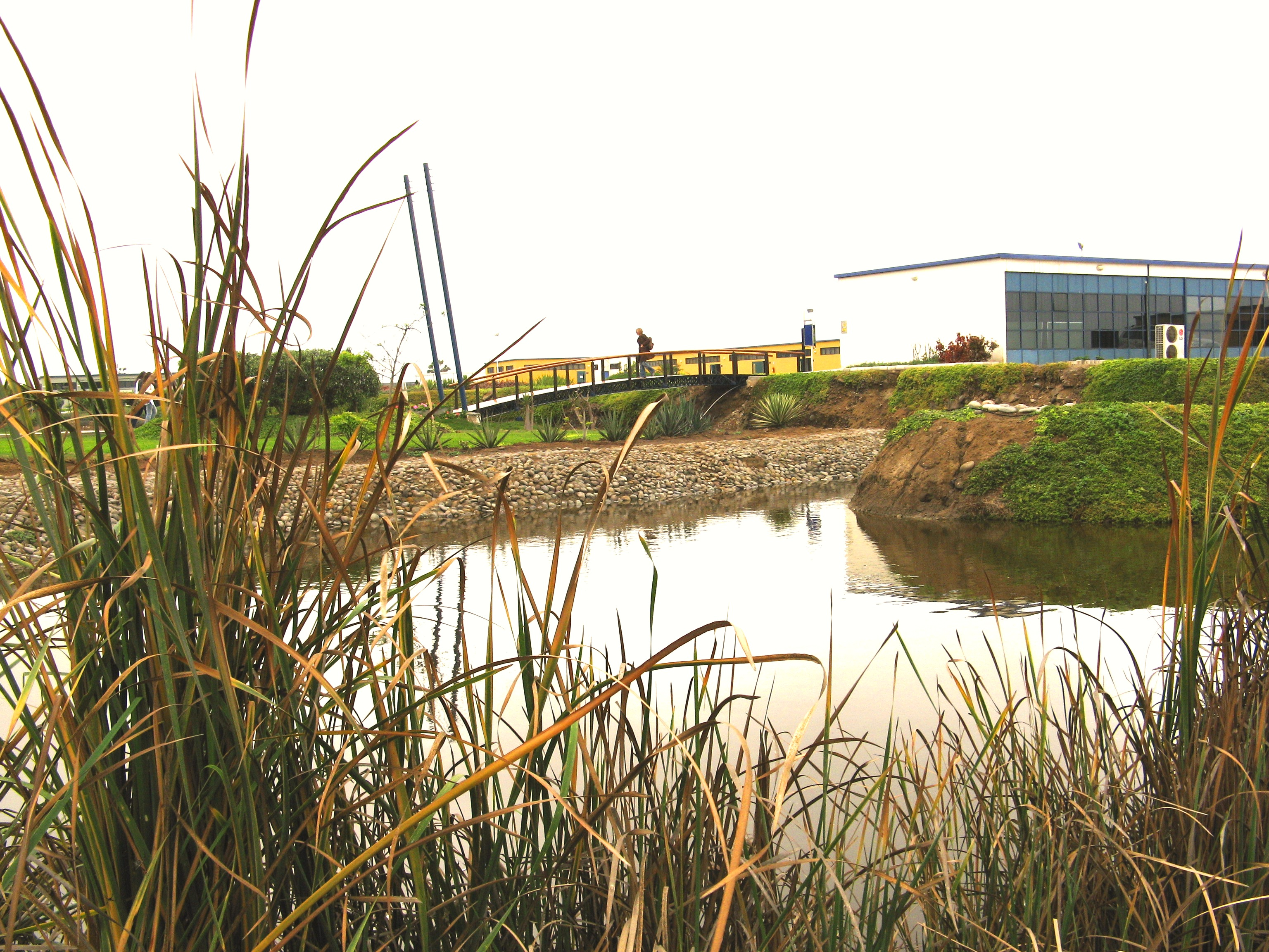 Campus Universitario Científica del Sur